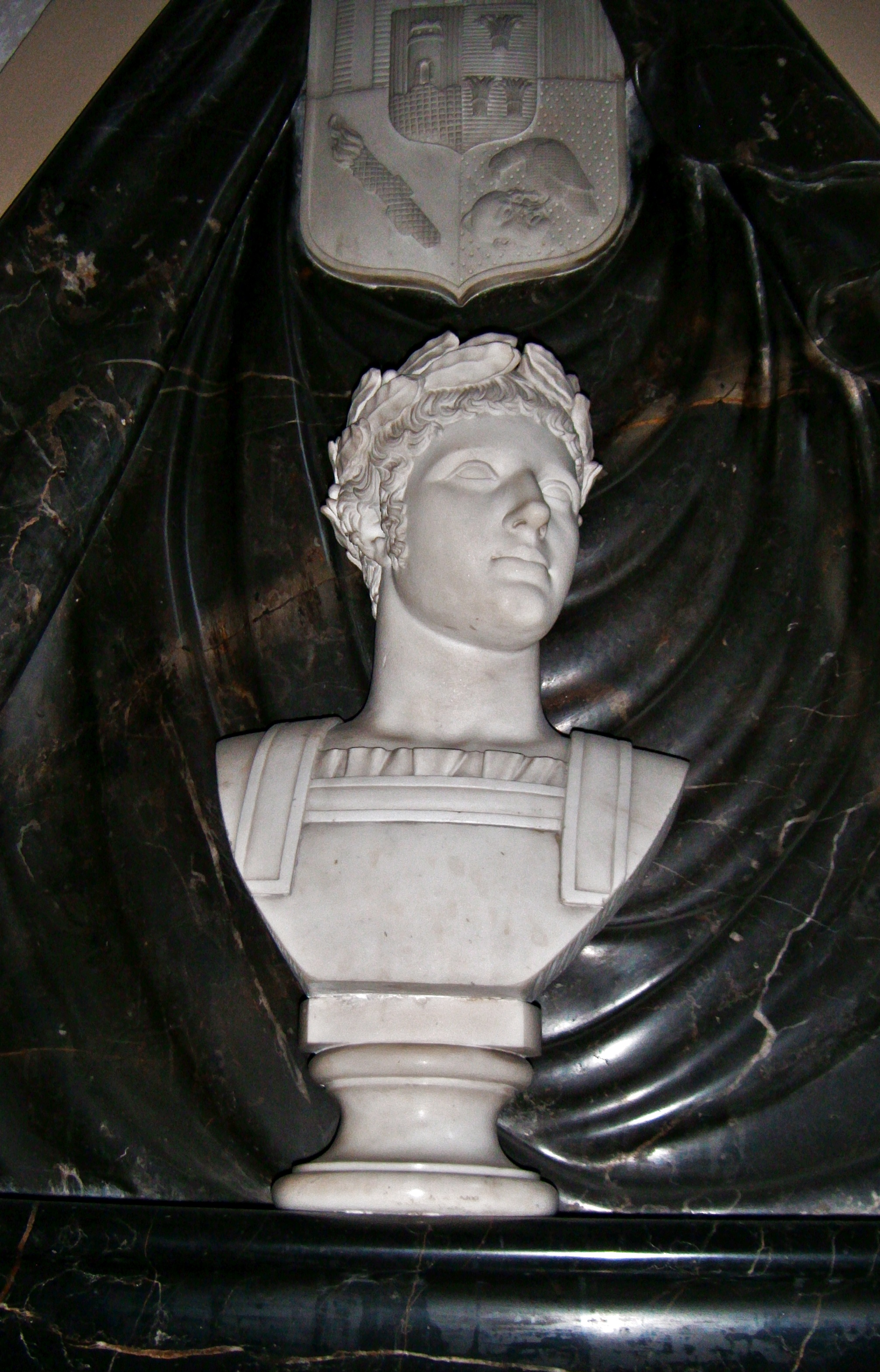 Friedrich Johann Nepomuk zu Schwarzenberg (1774-1795), Büste von seinem Grab in der Kirche St. Laurentius Weinheim, geschaffen von Maximilian Joseph Pozzi (1770-1842)